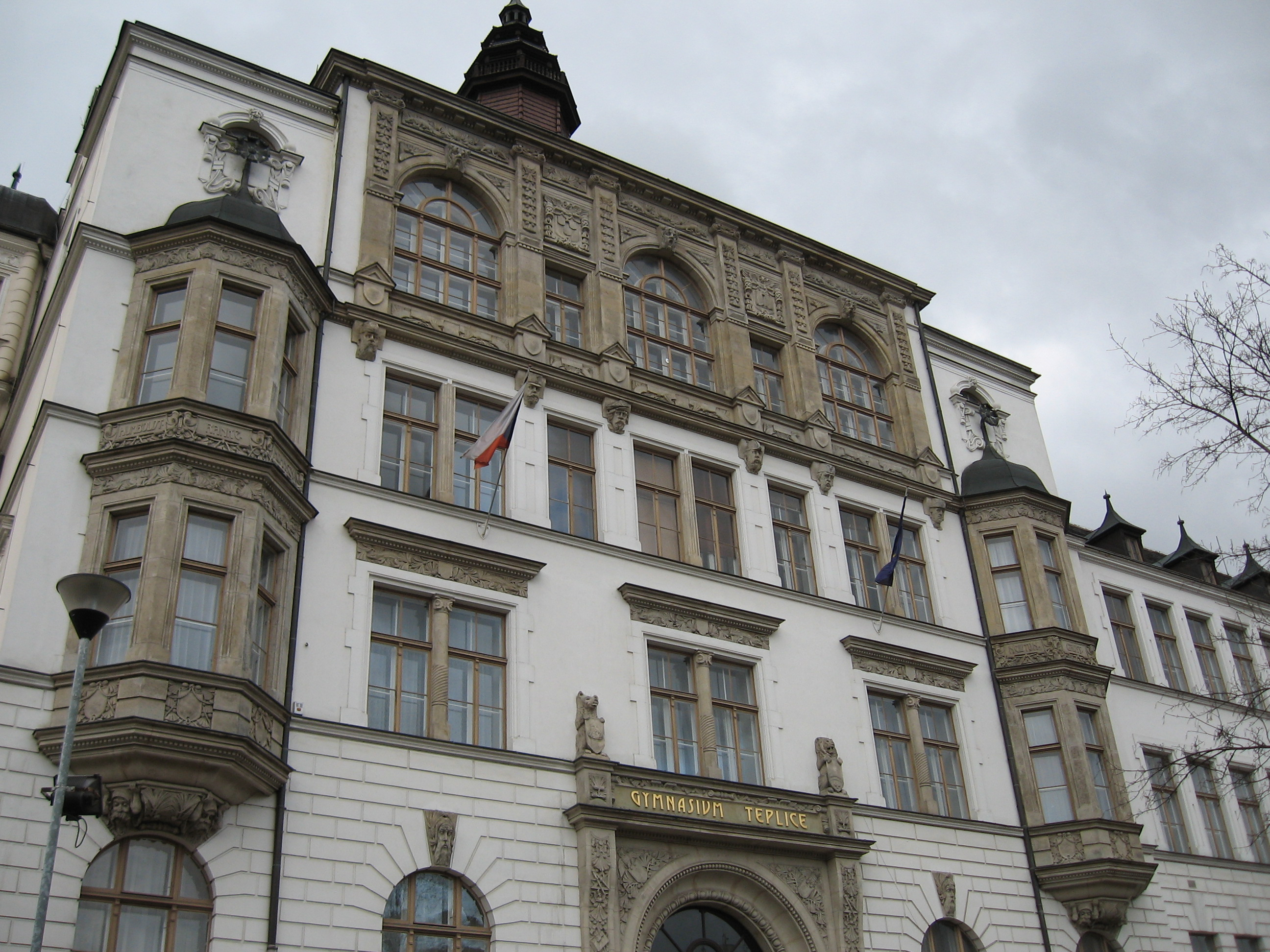 Budova gymnázia